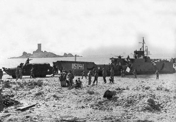 Arrivage d'hommes et matériels, les jours suivants le 15 août